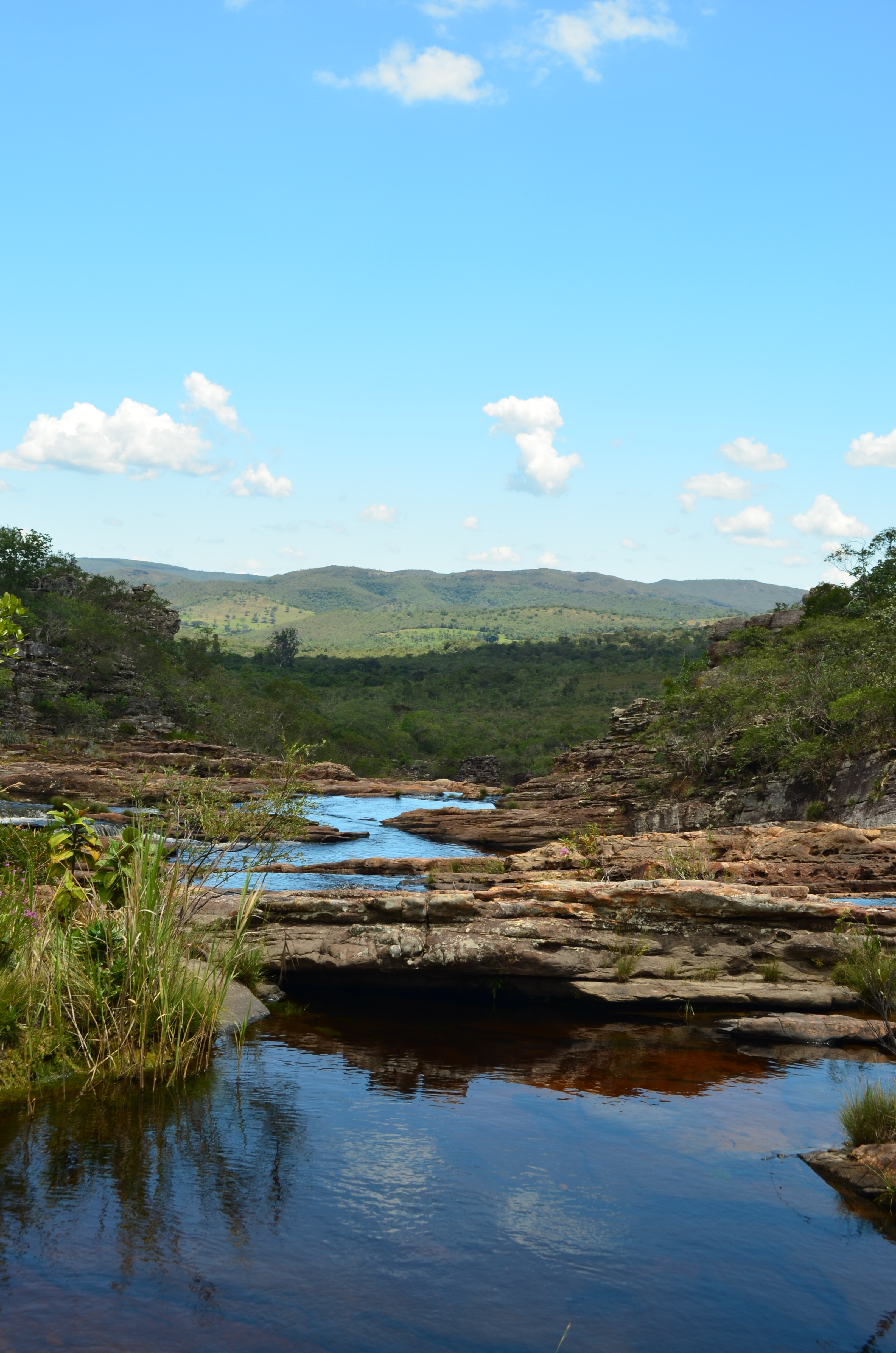 Visto do PE Serra Negra do cahoeira da fabrica.